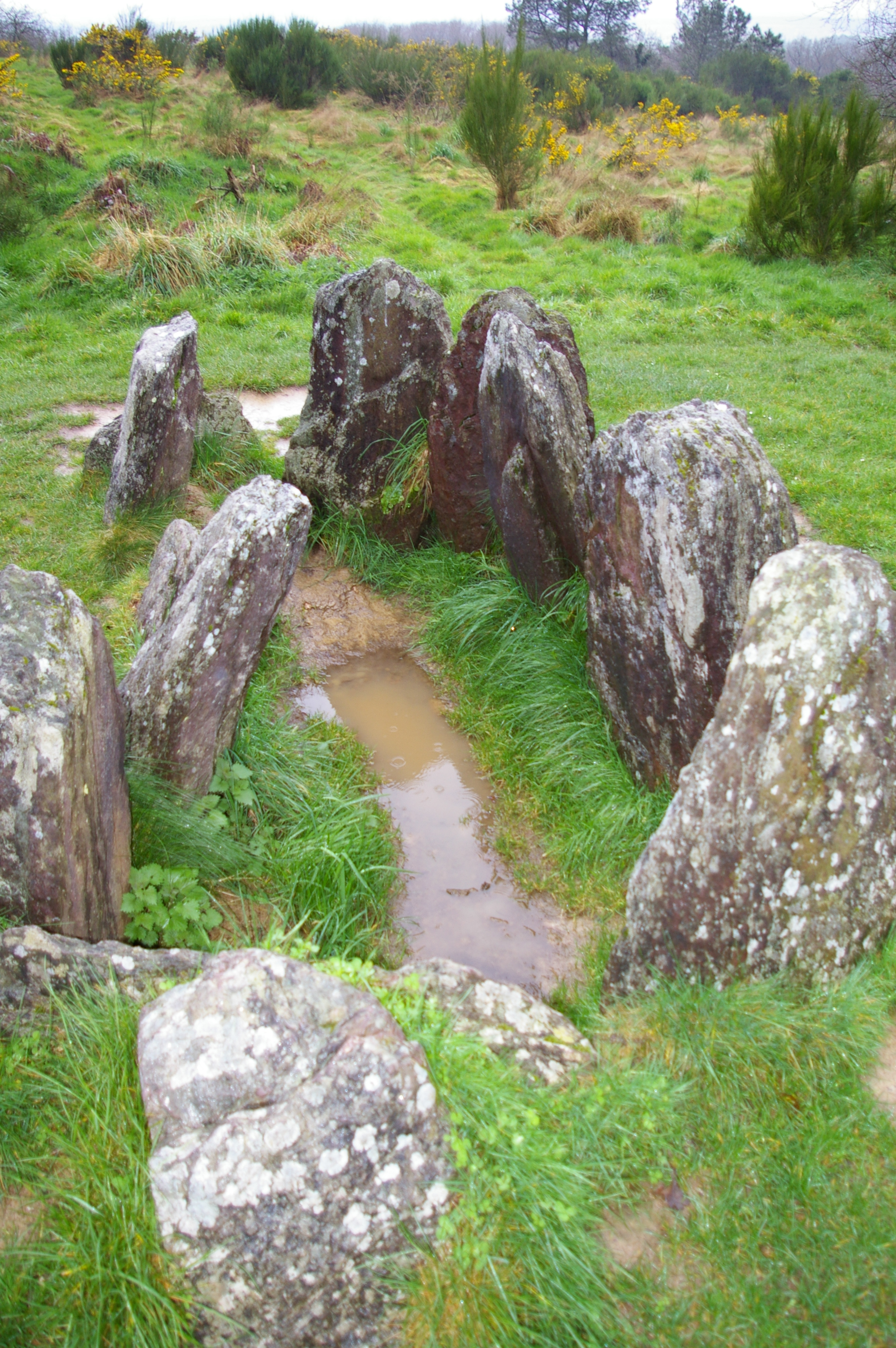 L'hotier de Viviane